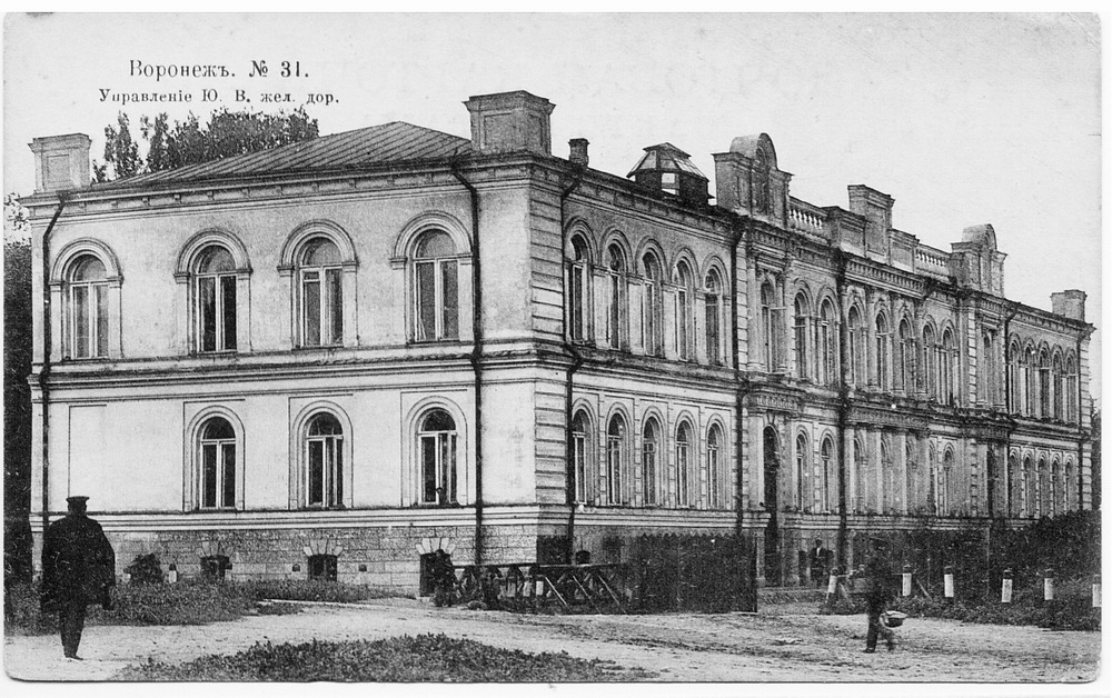 Управление Ю. В. жел. дор.